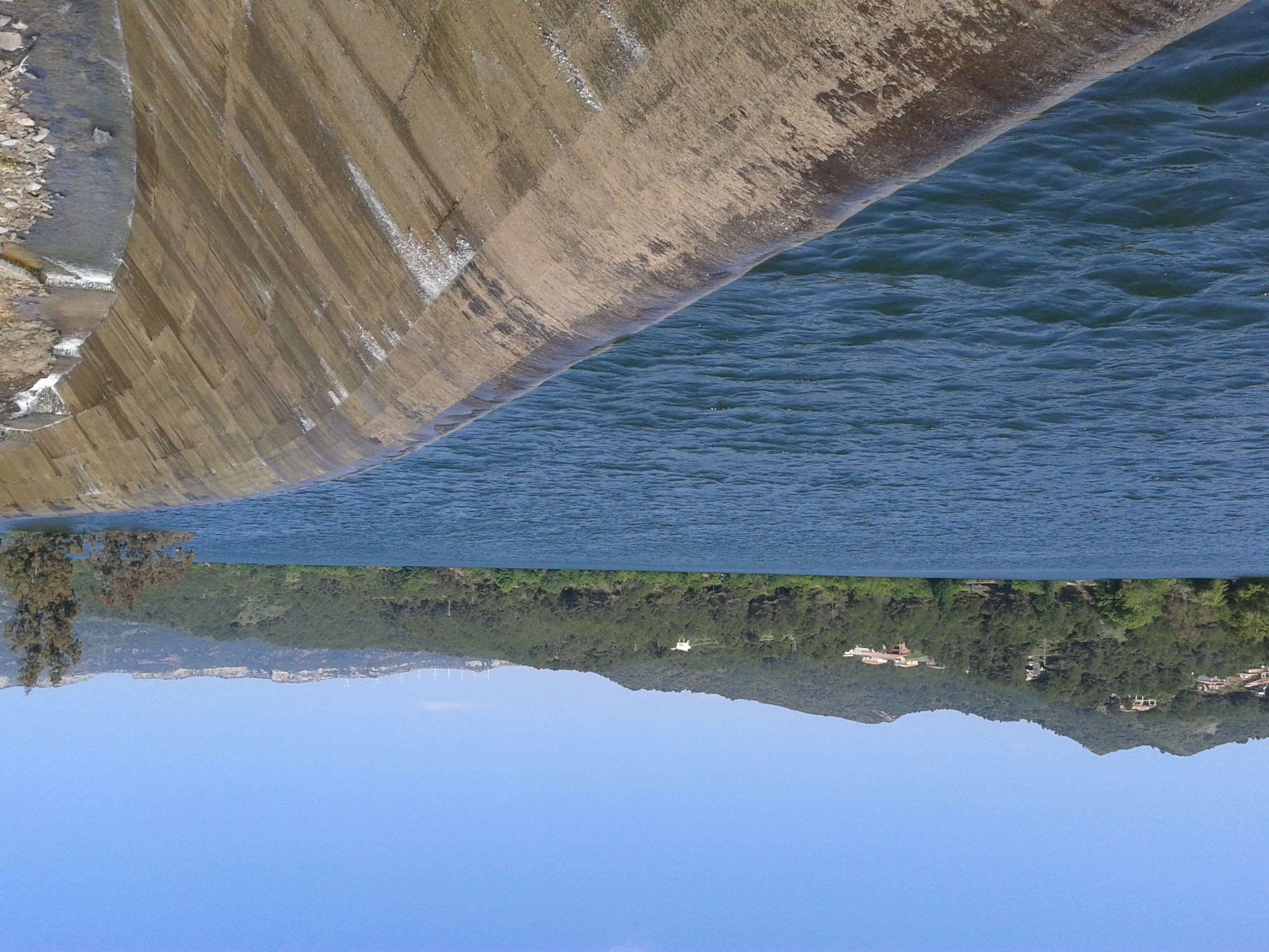 L'embassament de Riudecanyes sobreeixint-se